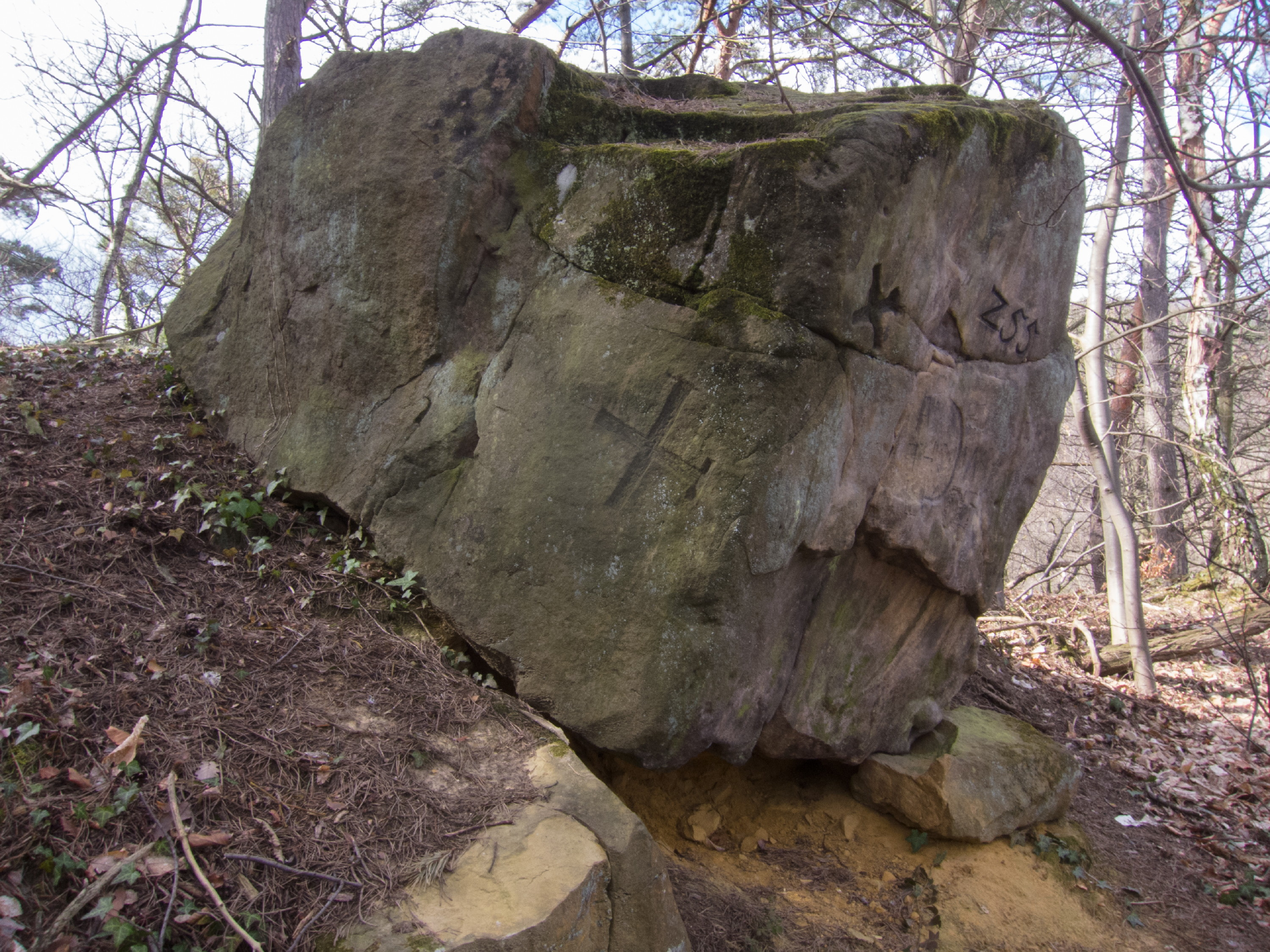 Naturdenkmal bei Deidesheim